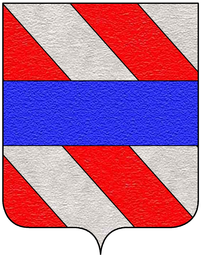 Stemma della famiglia Corsini